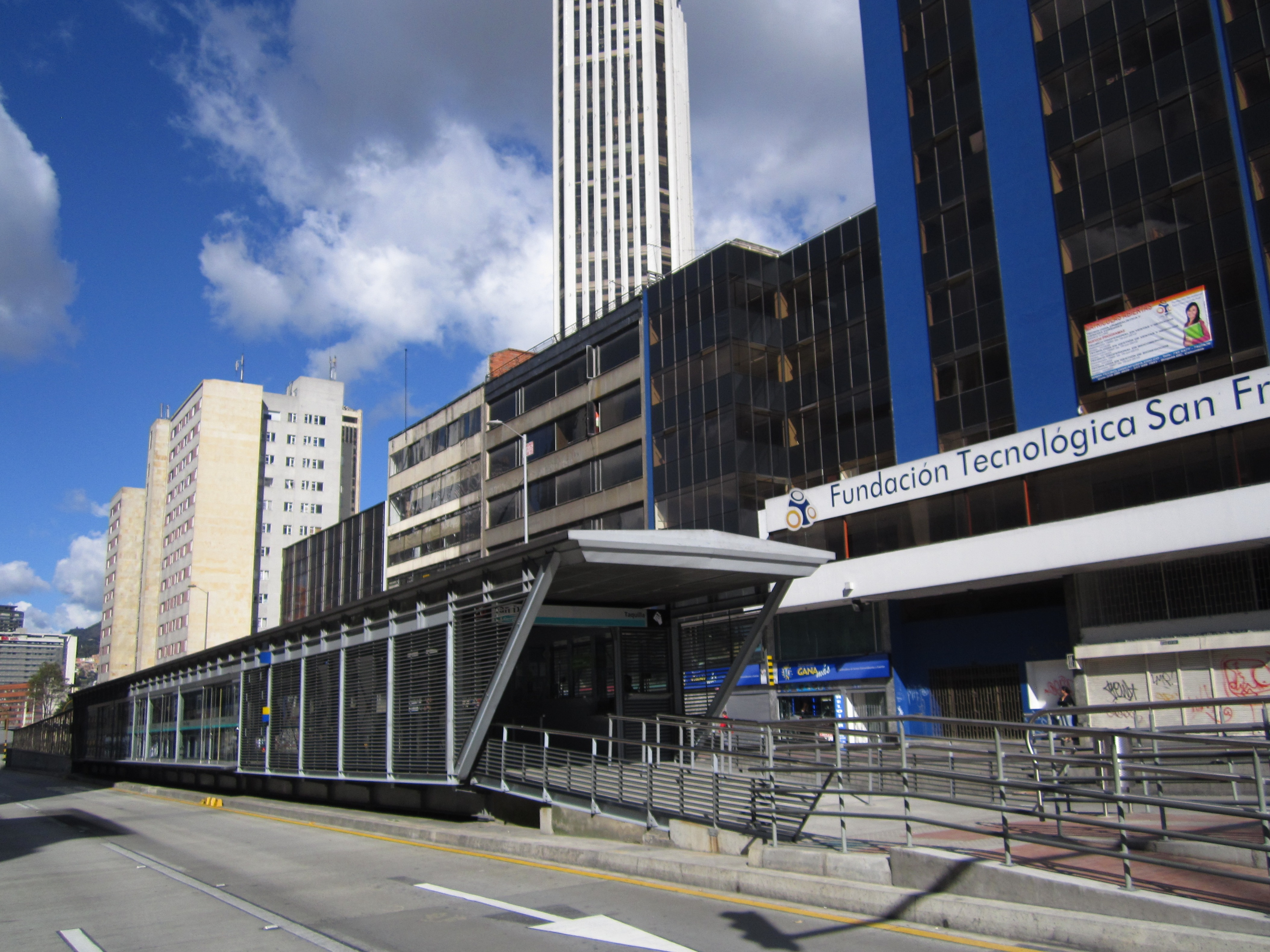 Bogotá estación San Diego del sistema de transporte Transmilenio.